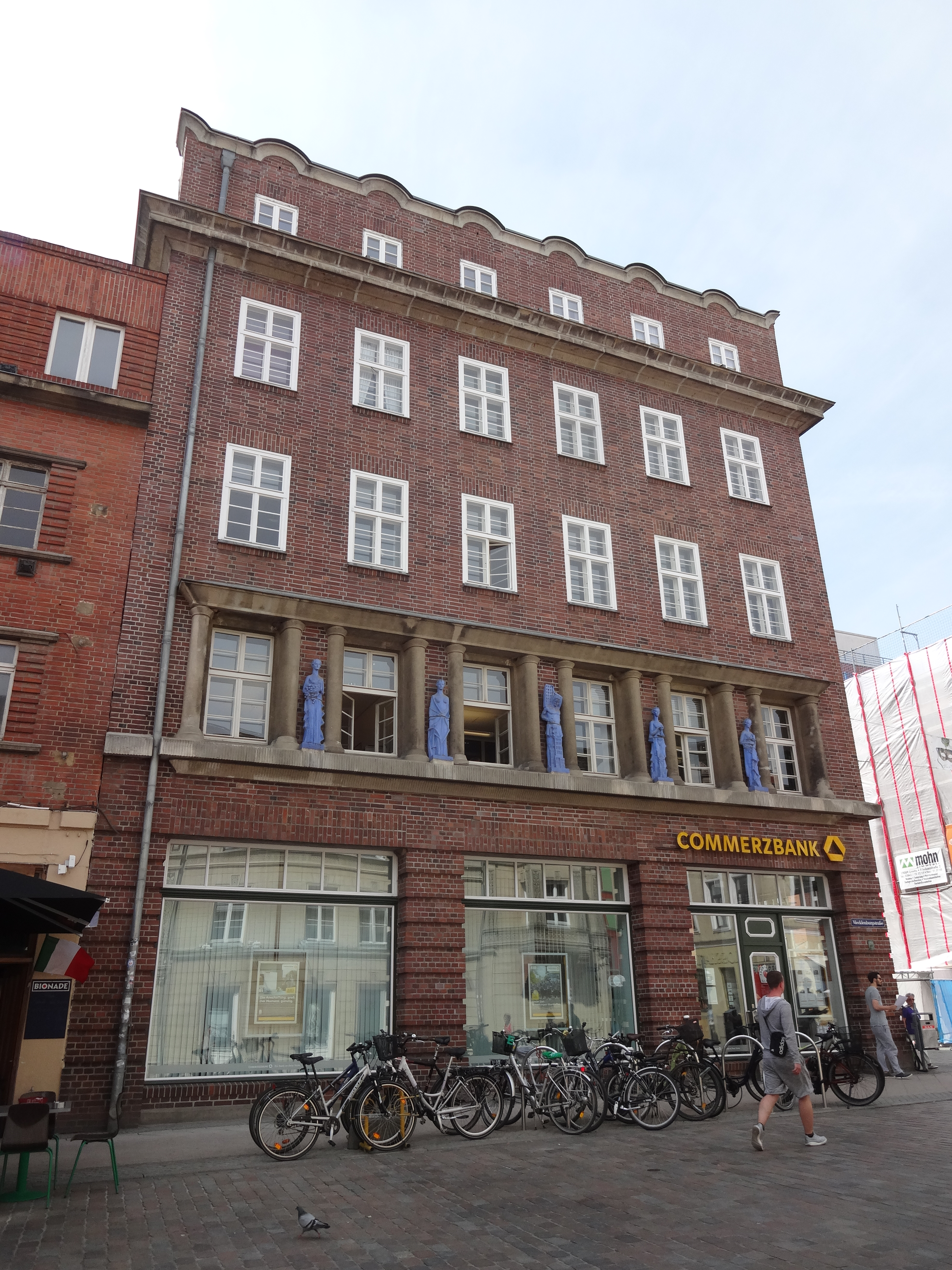 Denkmalgeschütztes Wohn- und Geschäftshaus in der Mecklenburgstraße 41/43/Schloßstraße 35; Ansicht Mecklenburgstraße; Commerzbank